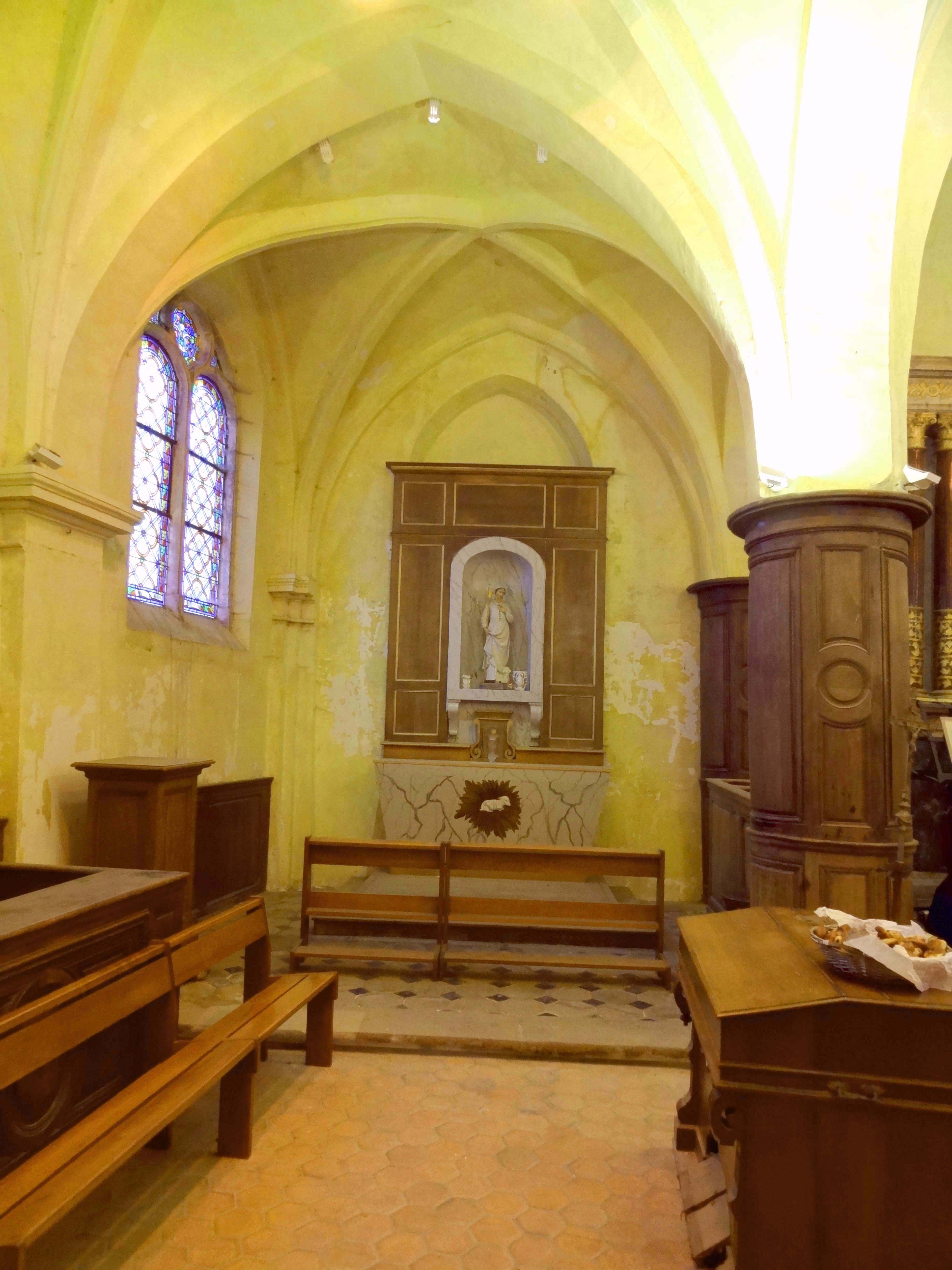 Intérieur de l'église - voir titre.